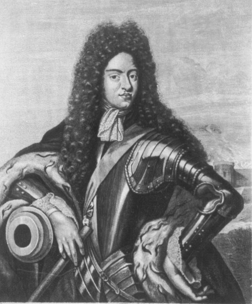 Johann Georg IV., Kurfürst von Sachsen